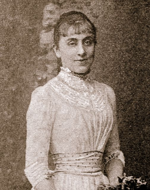 Die österreichische Burgschauspielerin Stella von Hohenfels-Berger (1858-1920)